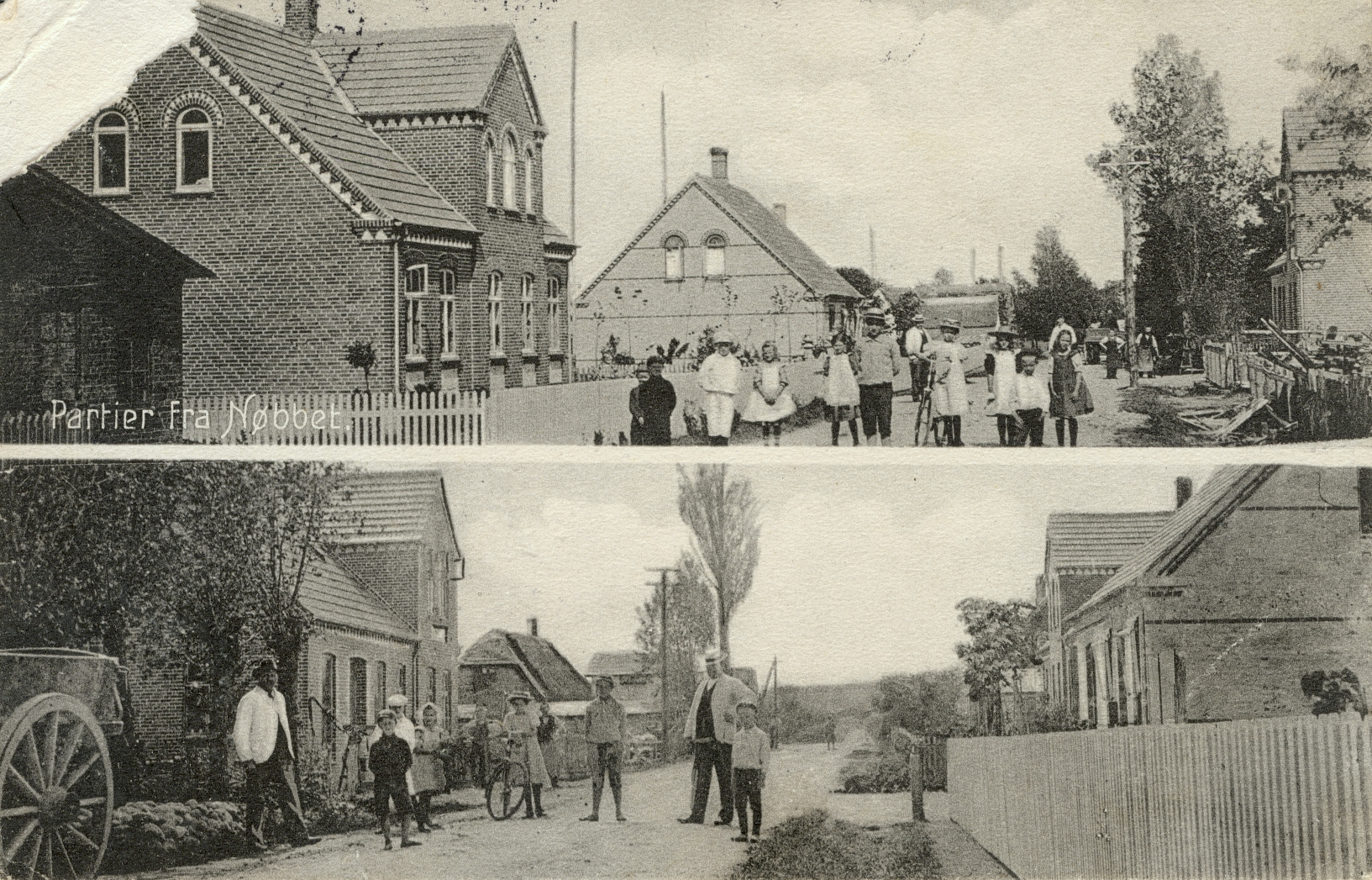 Nøbbet i Horslunde Sogn - historisk postkort fra Vest-Lolland